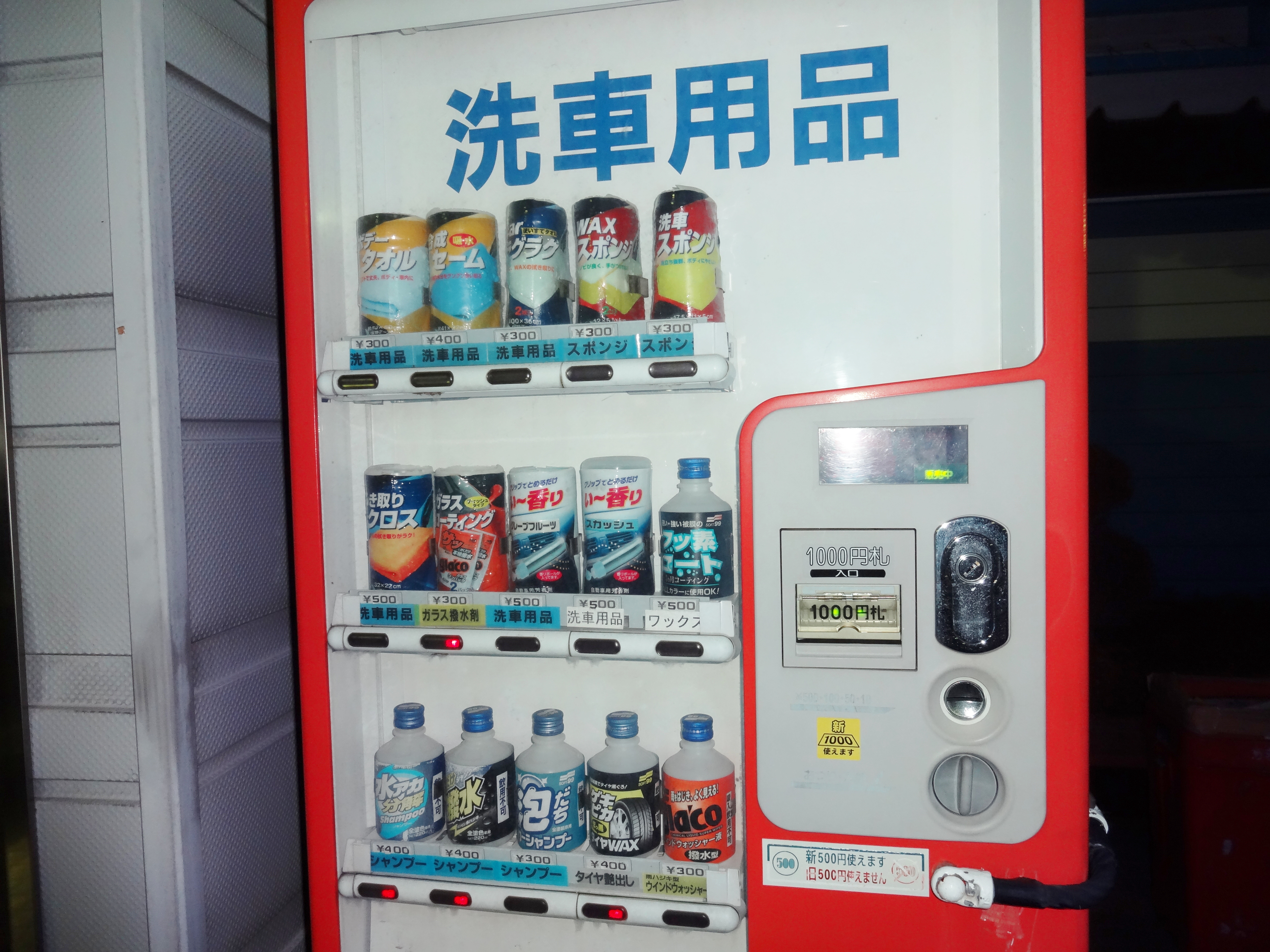 洗車用品自動販売機